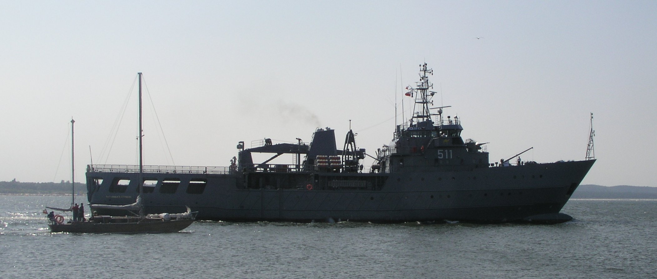 Polish Navy ship ORP Kontradmirał Xawery Czernicki near Świnoujście, Poland